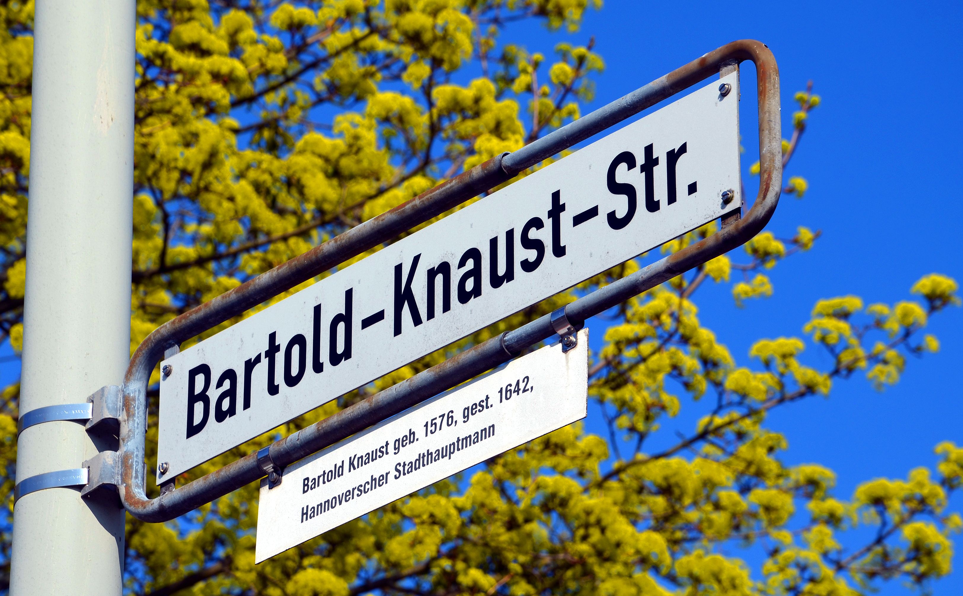 Die Legendentafel der Bartold-Knaust-Straße im hannoverschen Stadtteil Oberricklingen ehrt den im Dreißigjährigen Krieg gestorbenen „Bartold Knaust, geb. 1576, gest. 1642, Hannoverscher Stadthauptmann“ ...